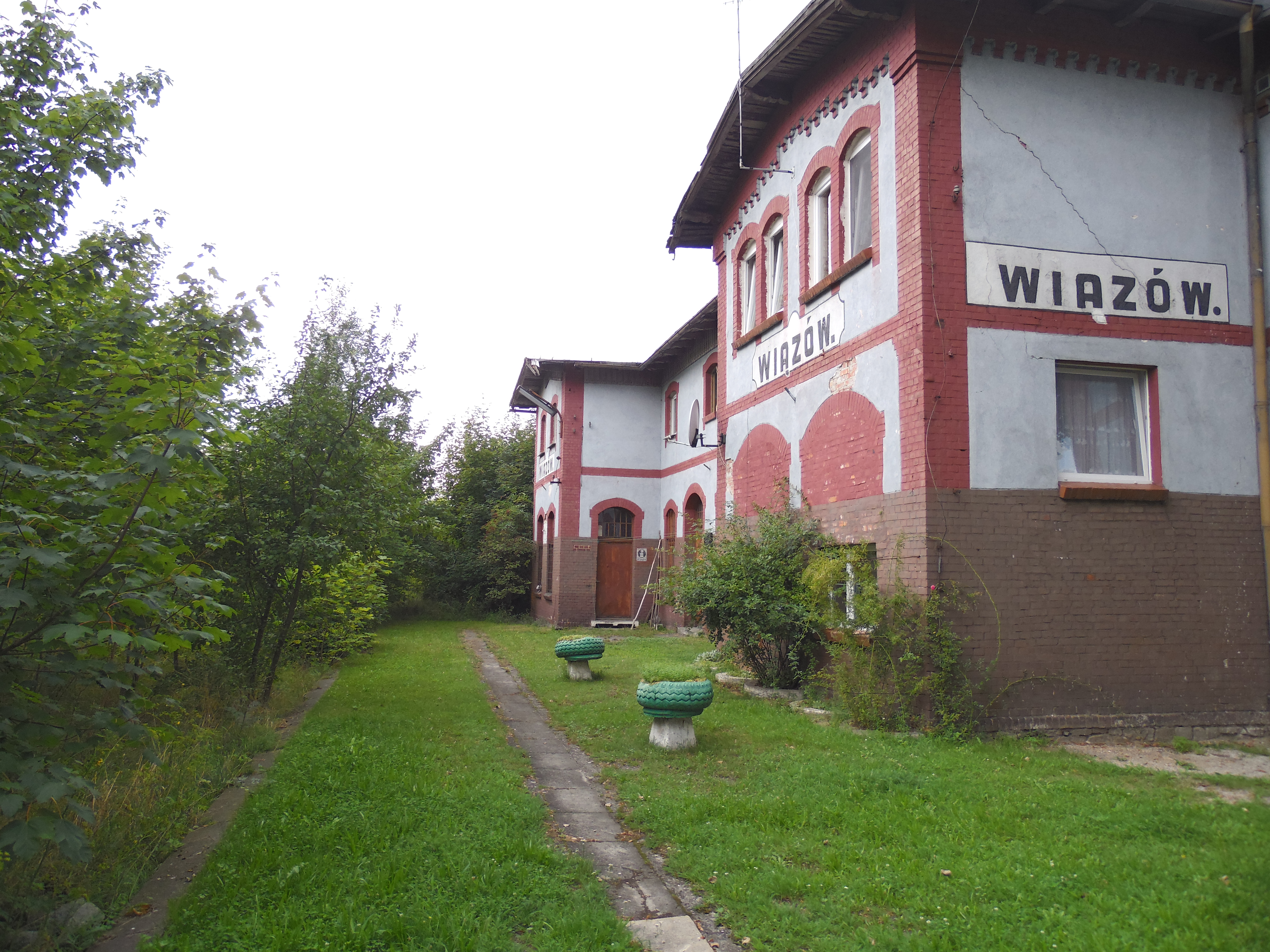 Wiązów, Poland